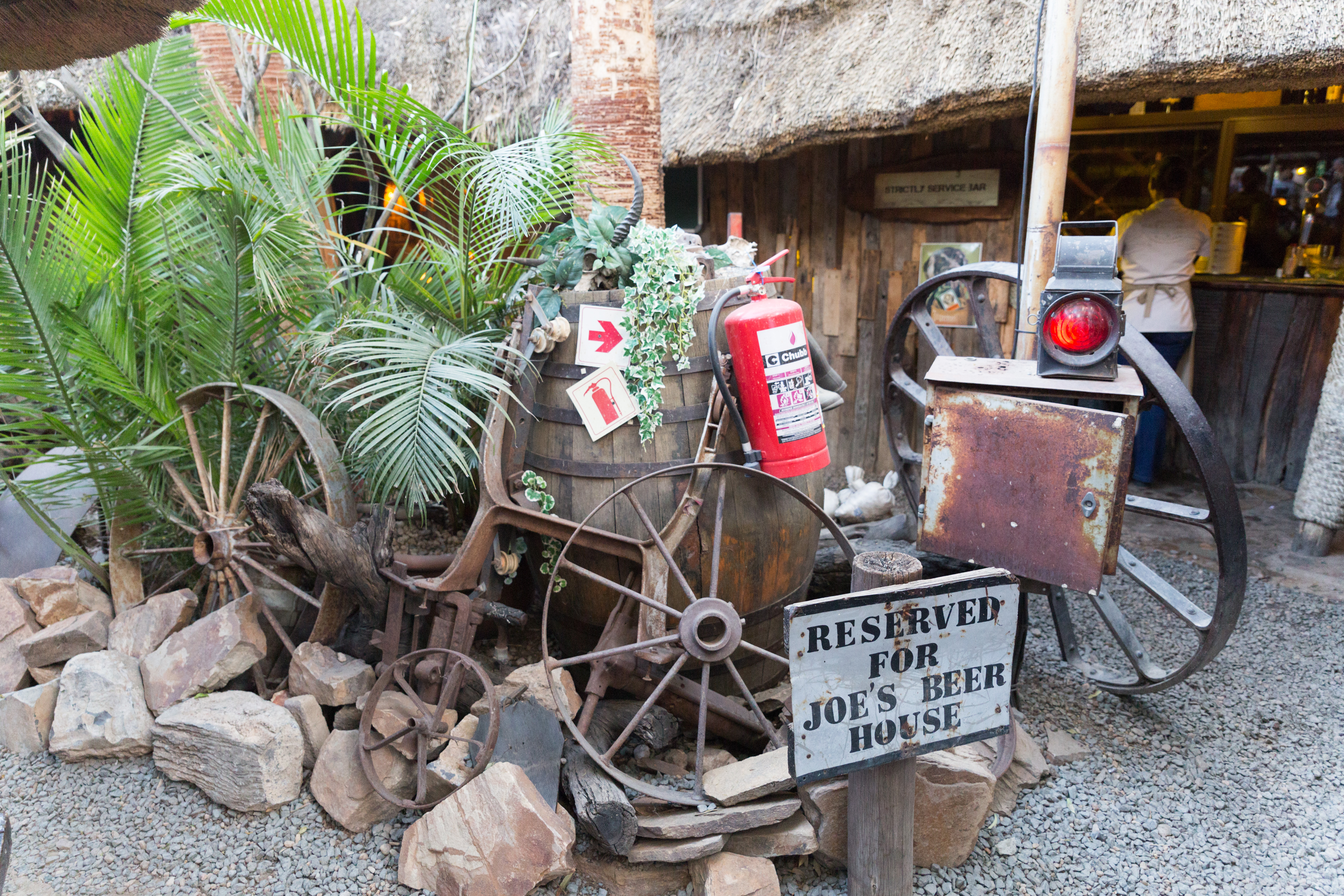 Joe's Beerhouse